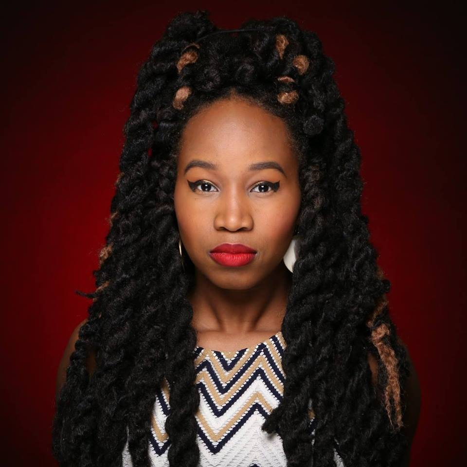 Kreyòl ayisyen : christine